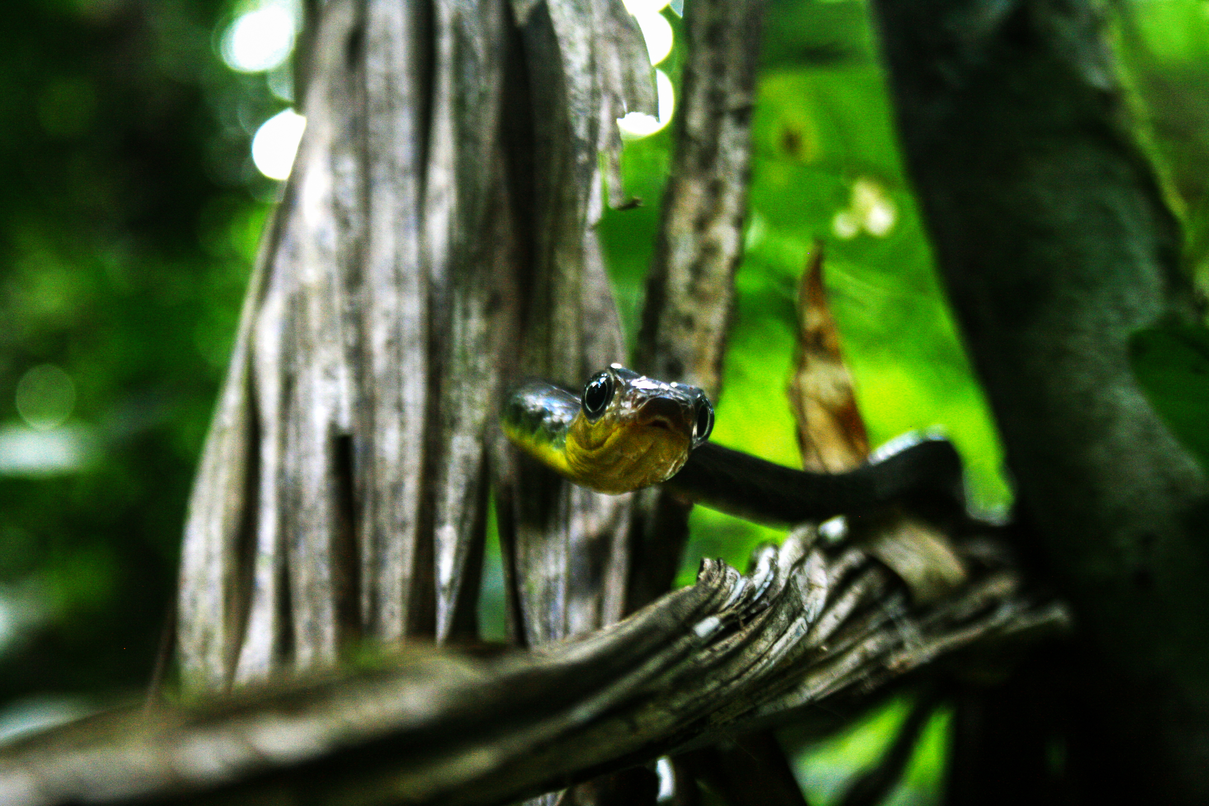 Chironius sp.